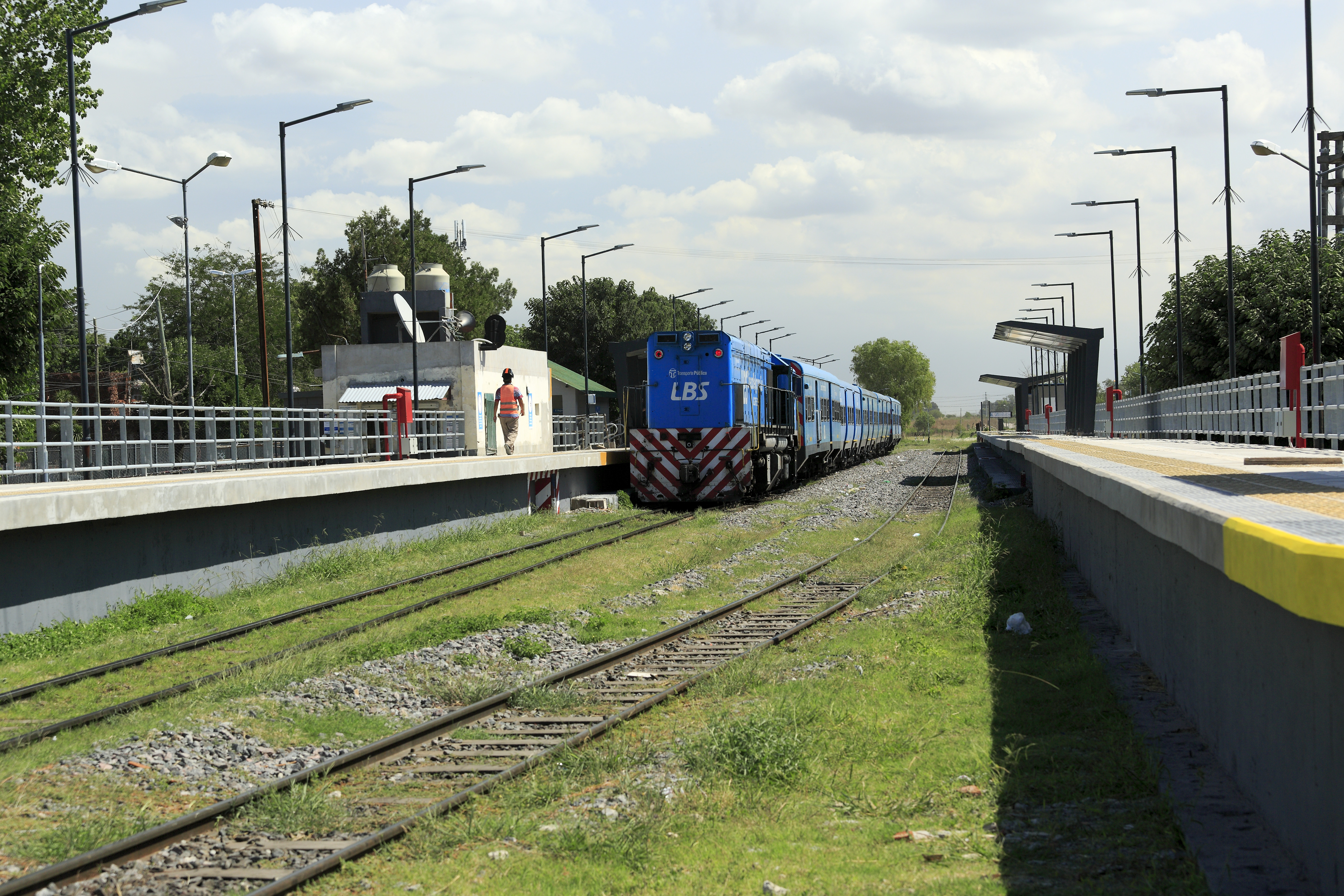 Die Bahnsteige des Bahnhofs mit dem möglicherweise patriotischsten Namen in Argentinien*) sind bereits auf voller Länge für drei Dreiwageneinheiten fertiggestellt. Die Gleislage passt noch nicht dazu, doch das rechte Gleis wird derzeit ohnehin nur als Lokverkehrs- und Umsetzgleis genutzt. Es ist jedoch vorgesehen, auch die Reststrecke zweigleisig auszubauen und möglicherweise zu verlängern und zu elektrifizieren. Dann wären beide Bahnsteige erforderlich.*) Dass die argentinische Militärregierung die »General Belgrano« und ihre Besatzung im ohnehin sinnlos ausgelösten Falklandkrieg ebenso sinn- wie chancenlos verheizt hat, spielt offenbar keine Rolle mehr. Vielleicht erhält der Name des Bahnhofs ja die Erinnerung daran frisch, dass dieser selbst ausgelöste Krieg das Ende der Militärdiktatur brachte.